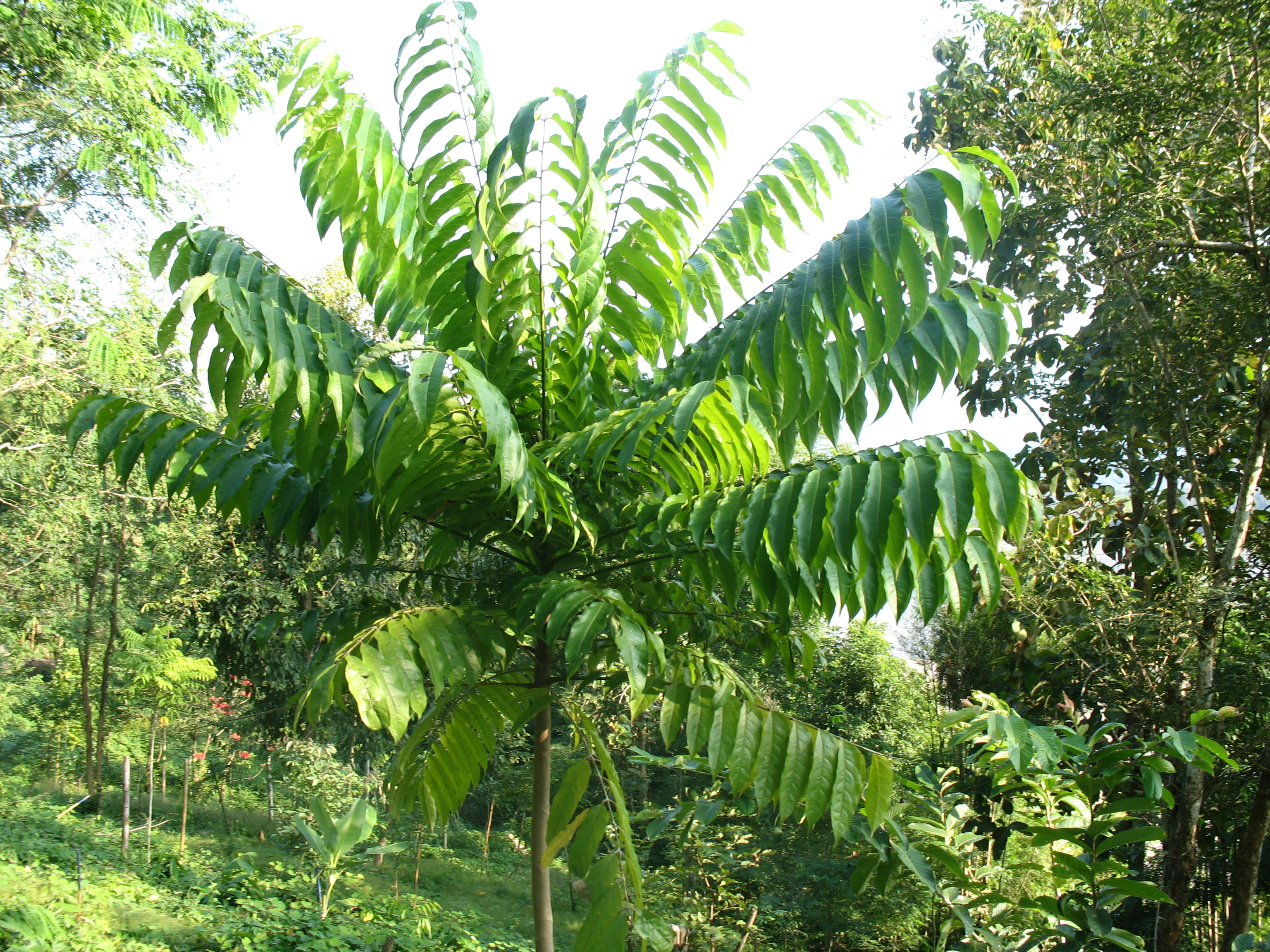 Un jeune pied de Dracontomelon au jardin botanique de Luang Prabang